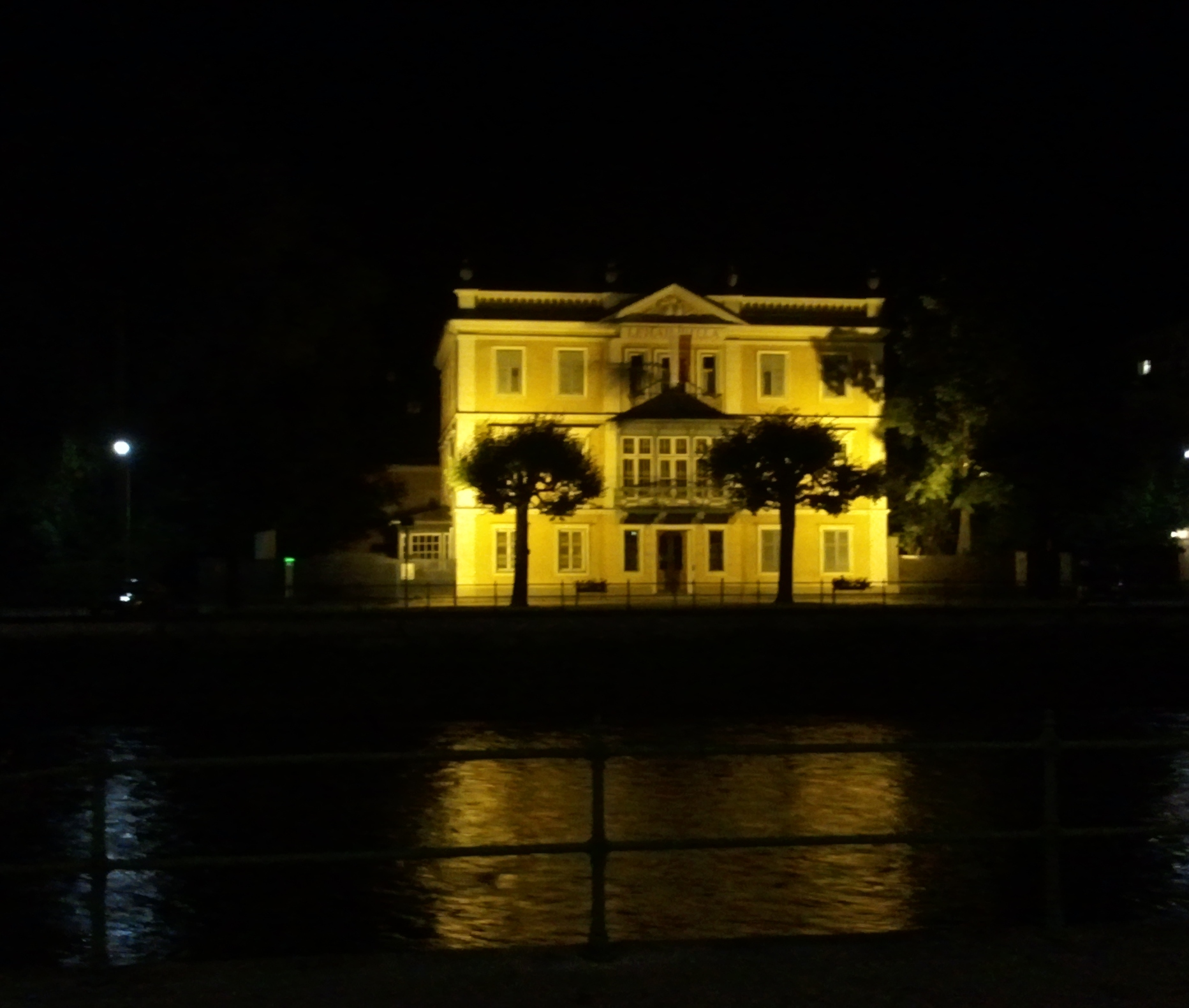 Lehar-Villa, Bad Ischl, Österreich, bei Nacht